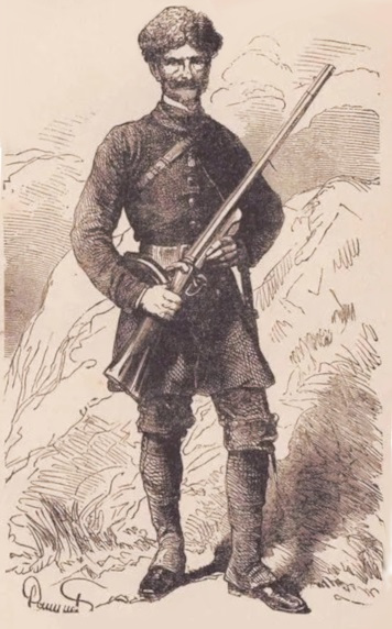 BOMBONNEL, le tueur de lions et de panthères